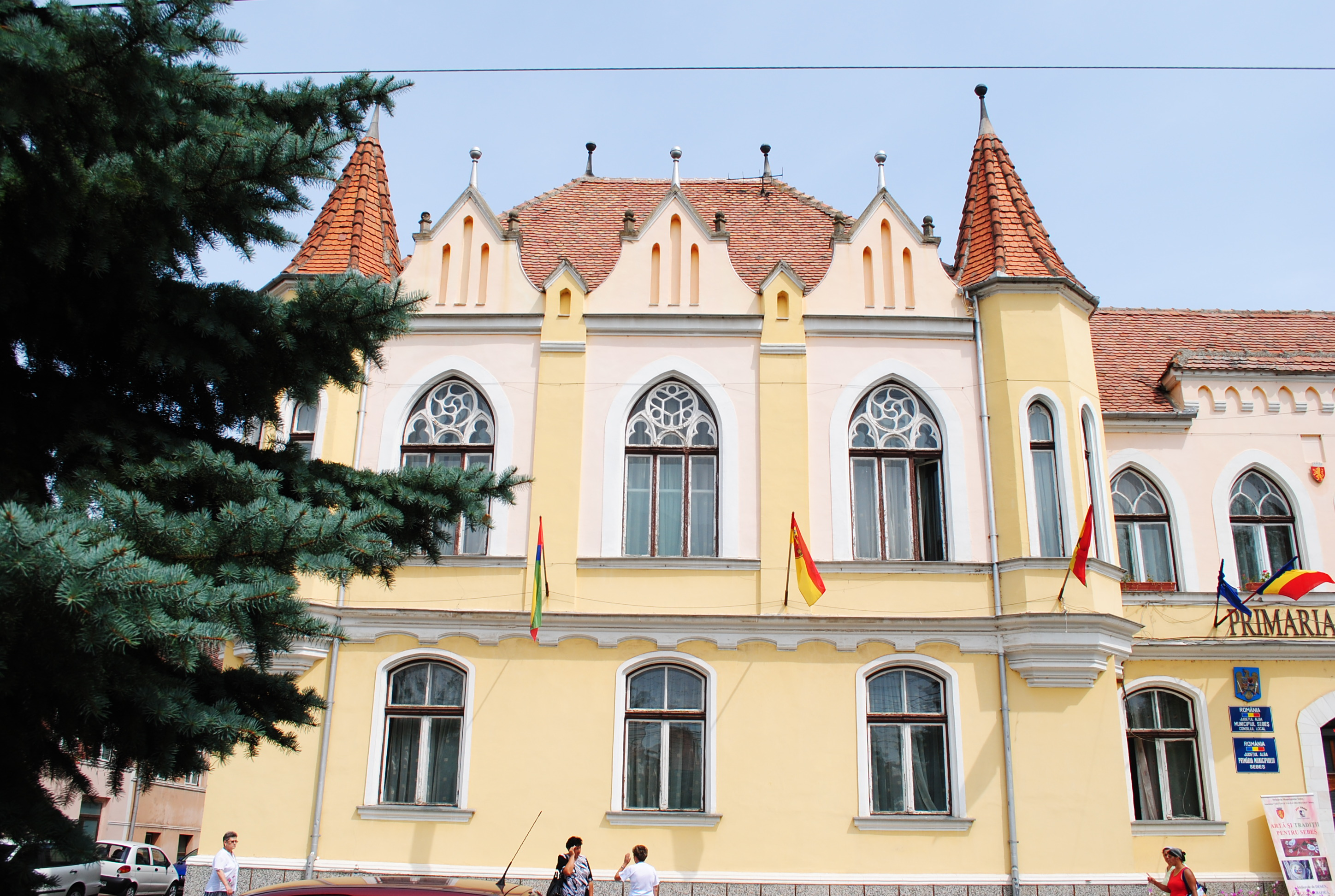 Primărie, cca. 1900